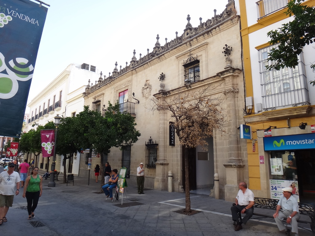 Palacio del Marqués de Villamarta (Jerez de la Frontera).